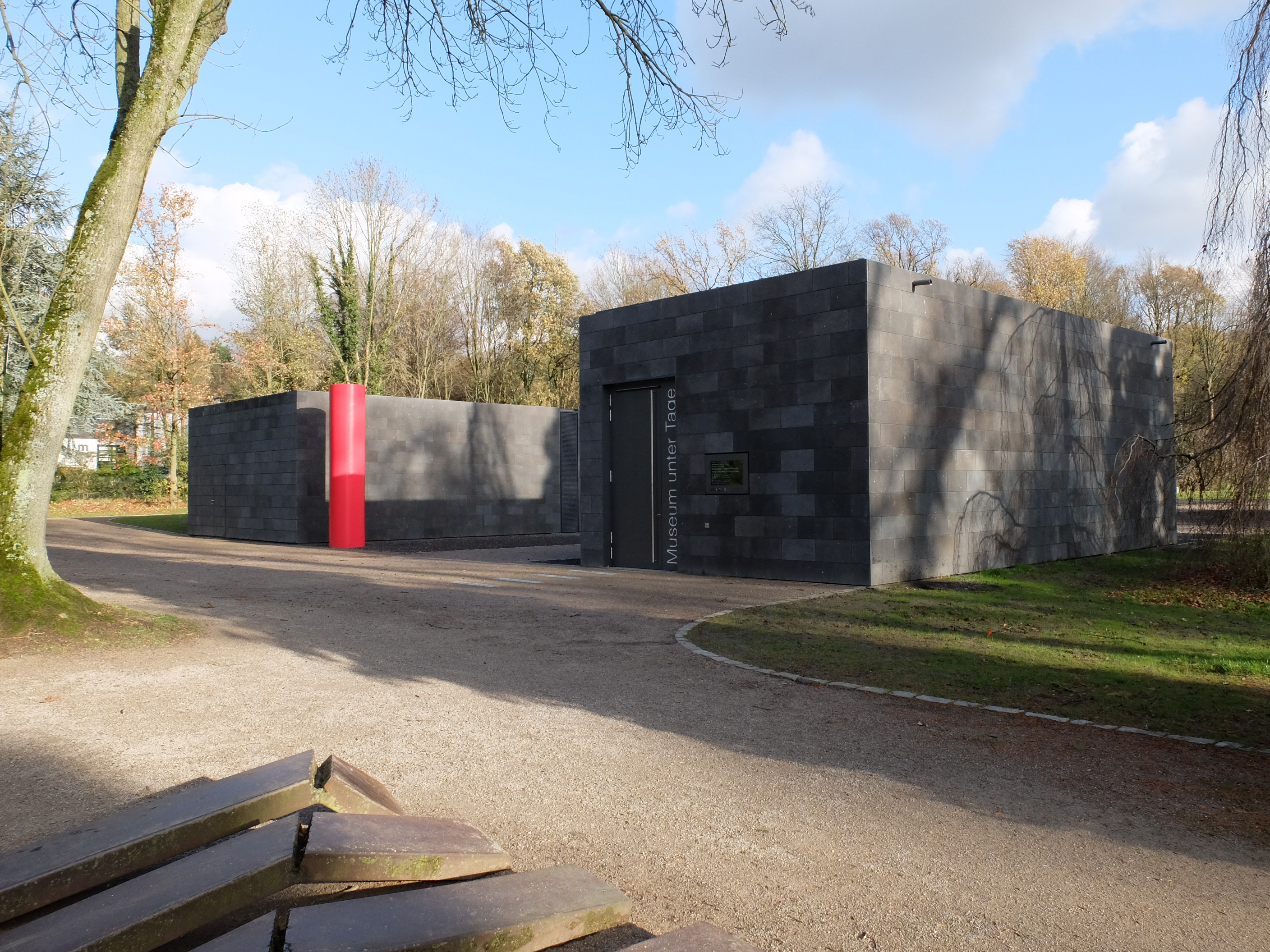 Museum unter Tage - Teil der Kunstsammlungen der Ruhr-Universität